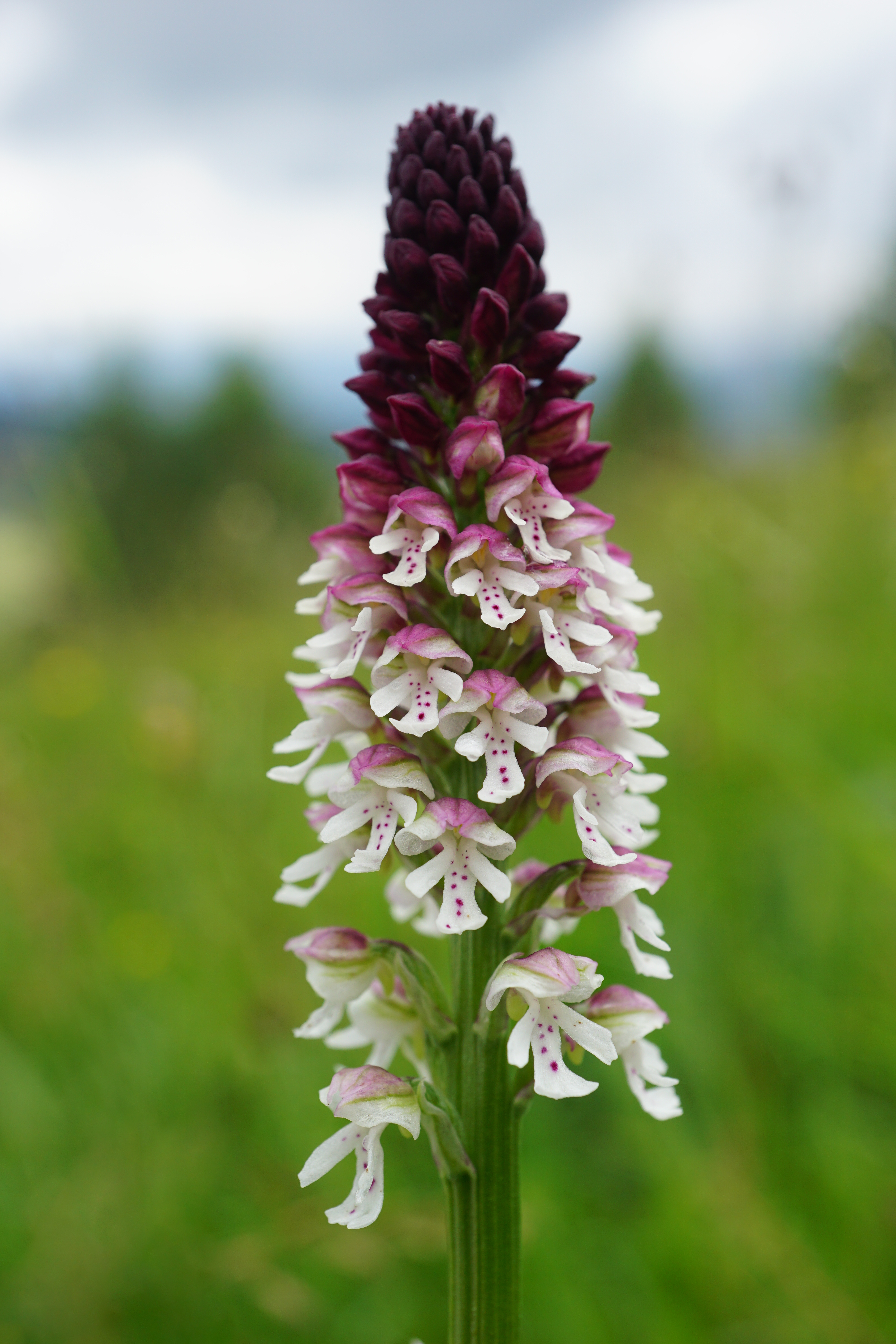 burnt orchid Brand-Knabenkraut